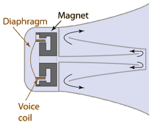 Folded Horn